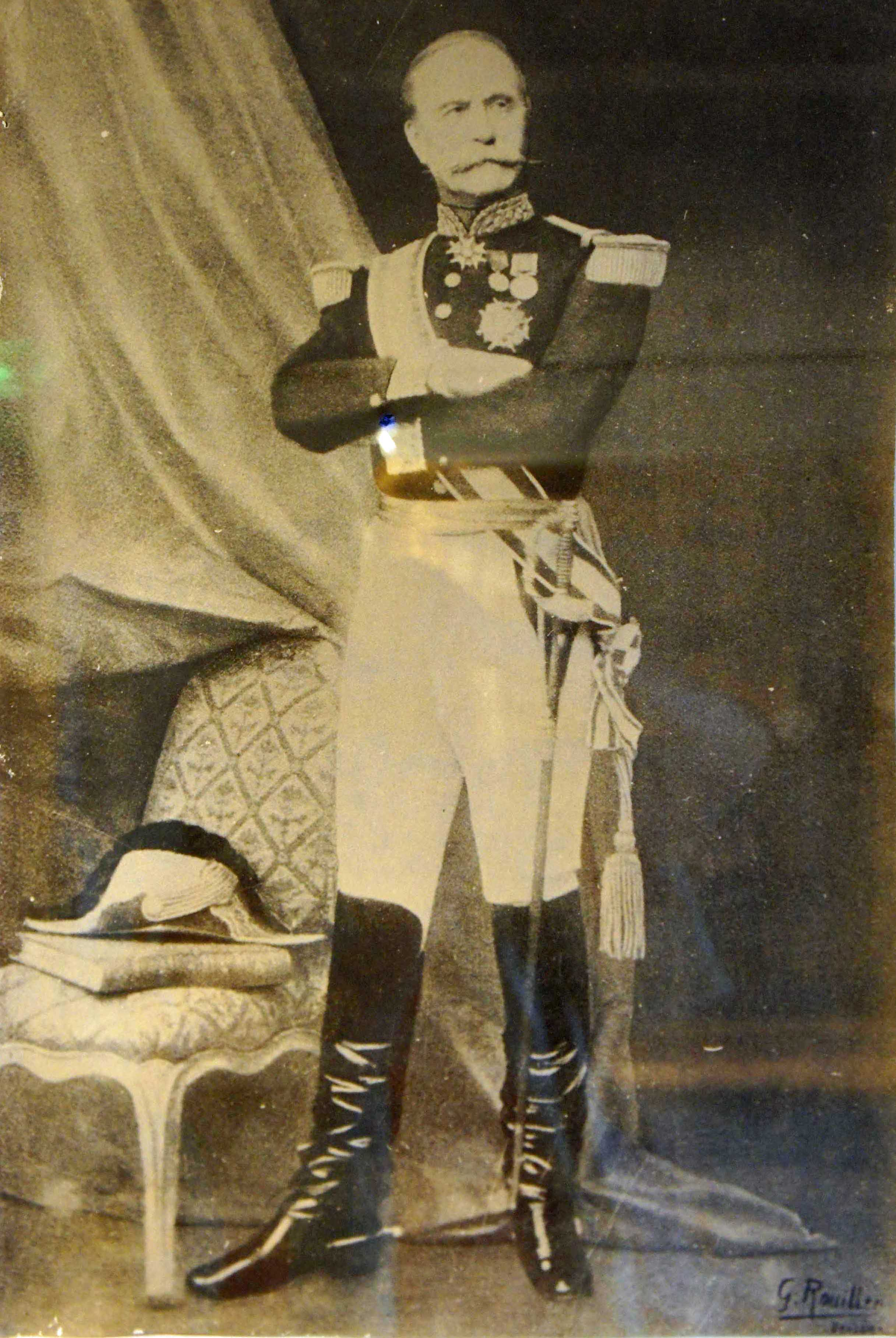 Elie_de_Vassoigne, photographie au musée de la dernière cartouche.